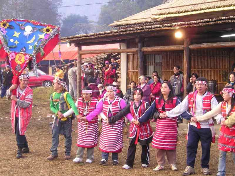 Pataai ceremonies in Nanzhuang, Miaoli, Taiwan Category:Taiwanese aborigines